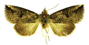 Elasmia mandela (2d) adults.